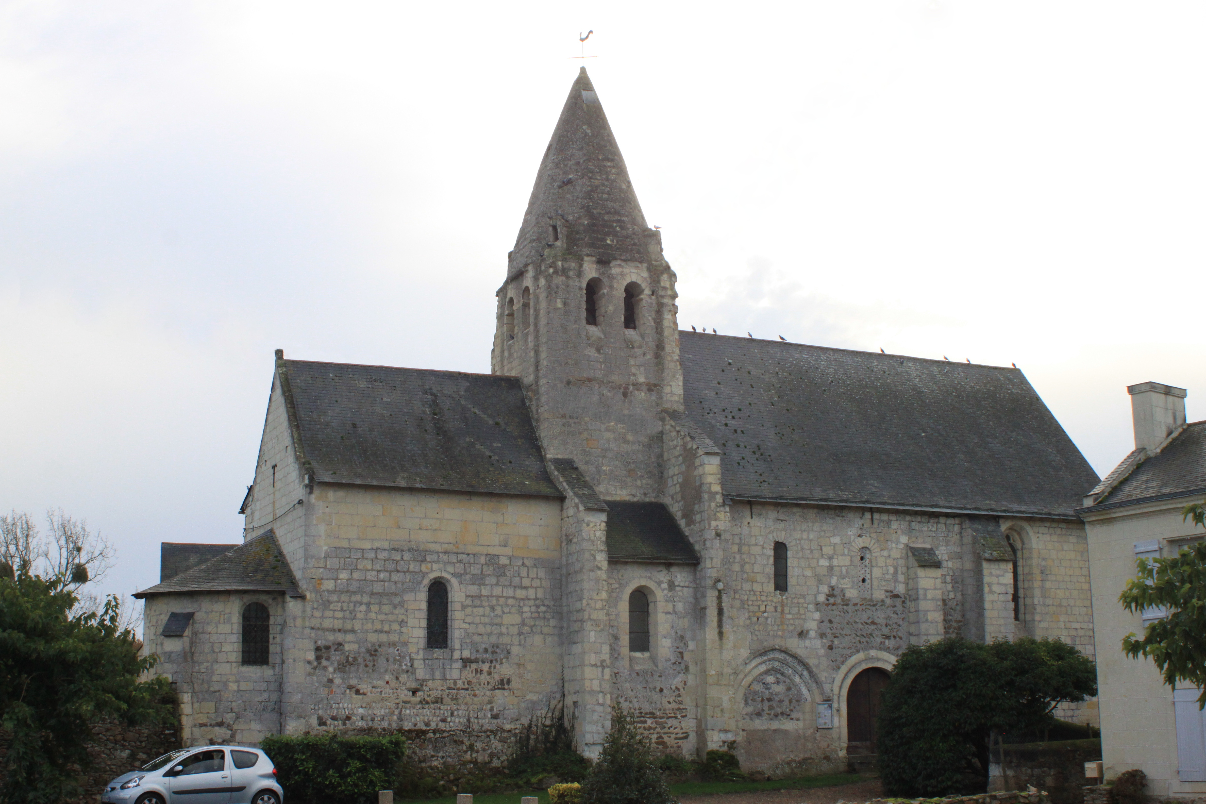 Église Saint-André, Fr-49-Verrie.